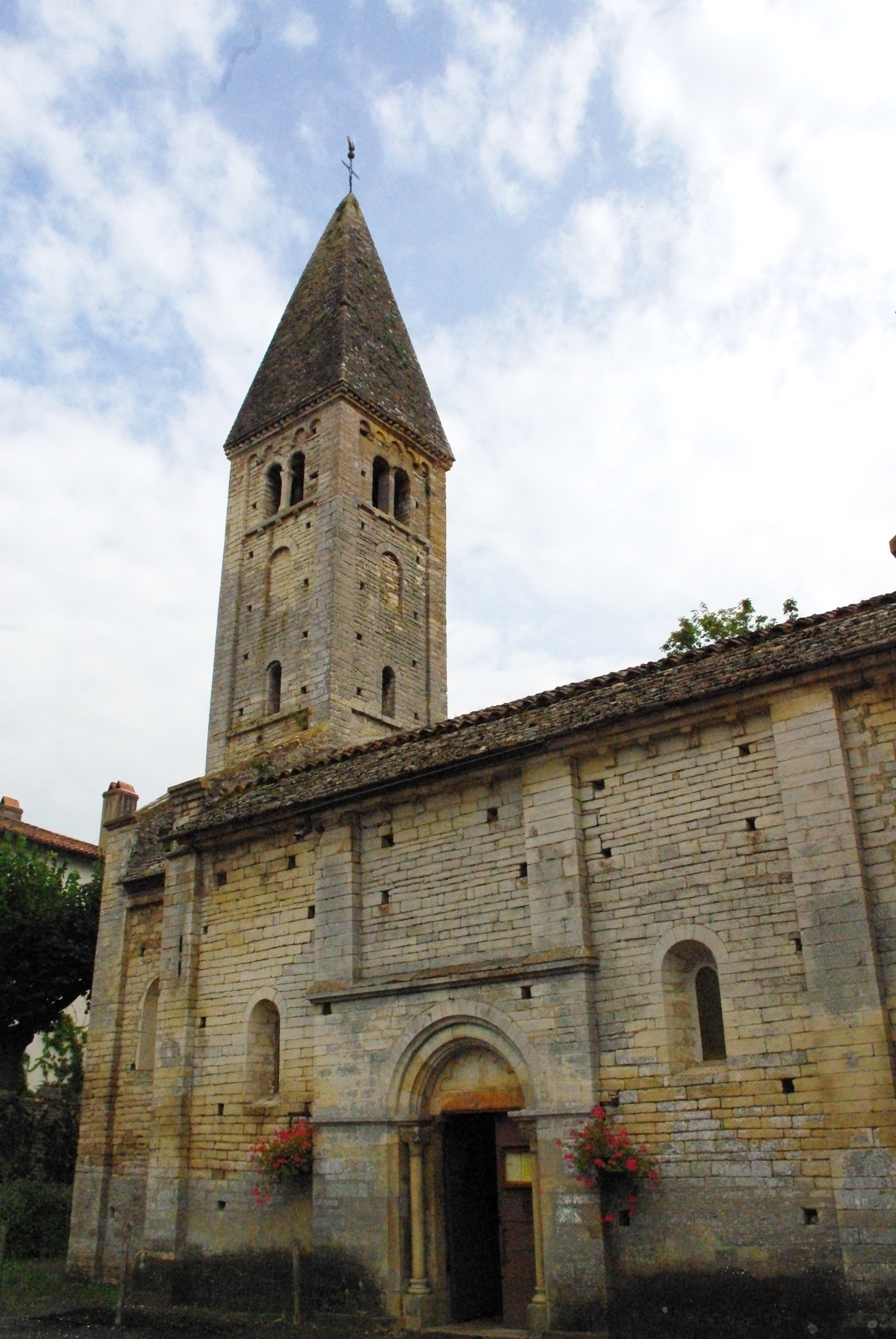 église de Chissey-lès-Mâcon, Saône-et-Loire